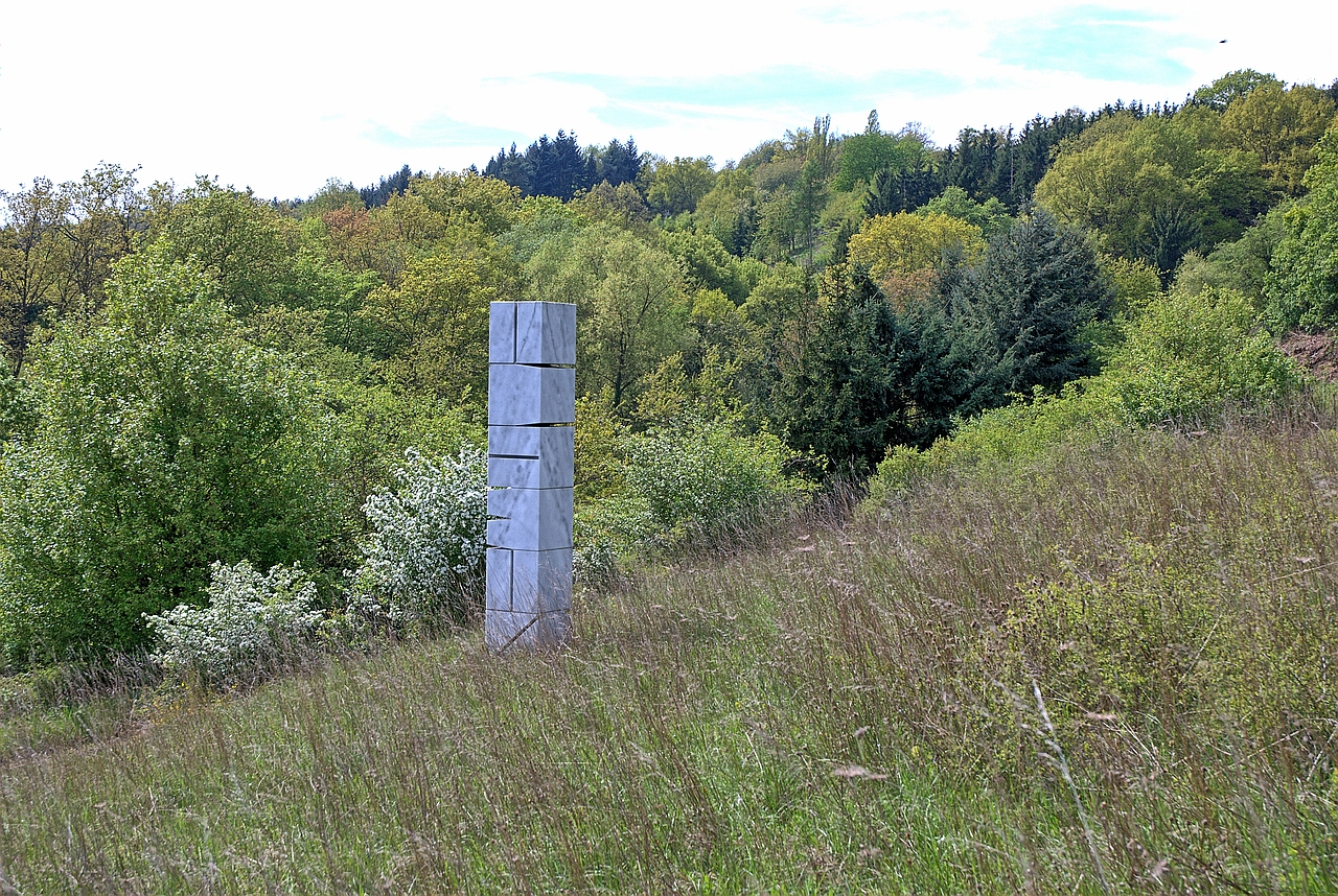 Schriftsäule "Ich bin" (1996) von Hans Schmidt (*1923 Leipzig, lebt seit 1984 freischaffend in Badenhard / Hunsrück), von hinten fotografiert. Heller Marmor, 330 x 55 x 55 cm. Standort: Skulpturenweg Oberwesel